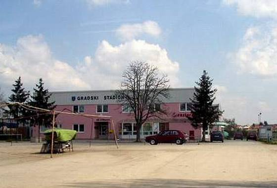 Stadion "Sajmi?te" u Vrbovcu, NK Vrbovec